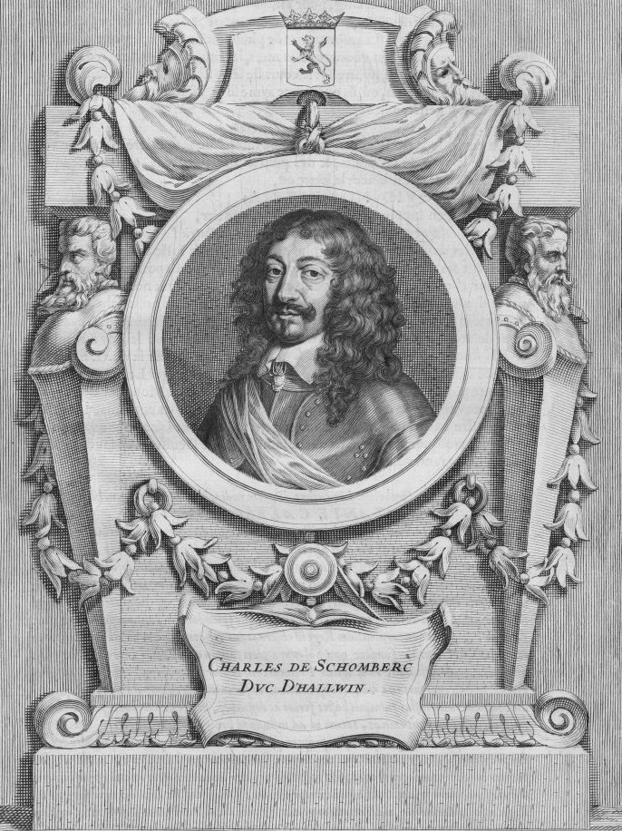 Portrait Charles de Schomberg (1601-1656), Kupferstich 1649